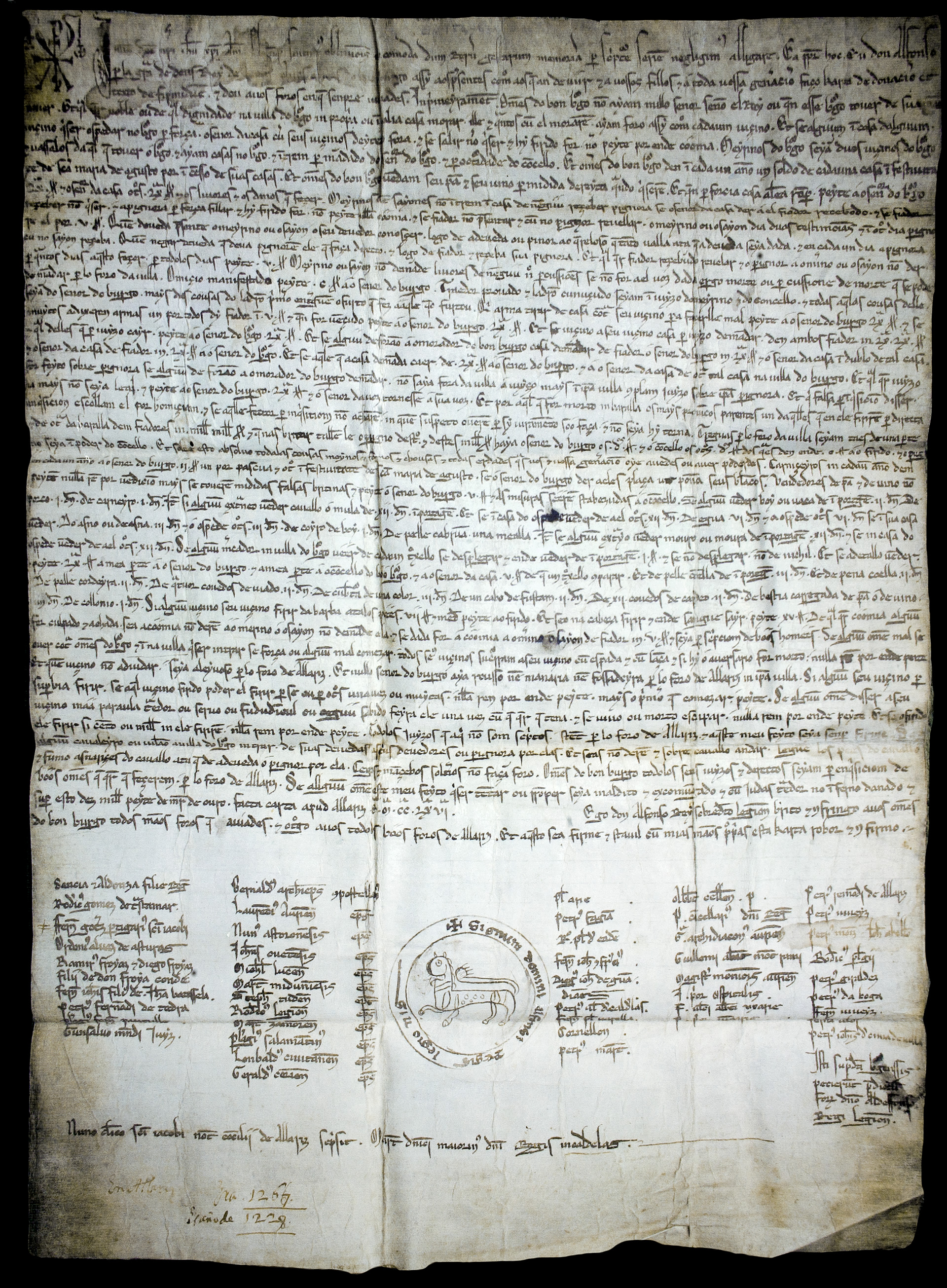 Composisión do Foro do Bo Burgo de Castro Caldelas, documento en galego do século XIII (abril de 1228), atopado na Casa de Alba editado polo Consello da Cultura Galega. Documento de Privilexio Real Rodado.